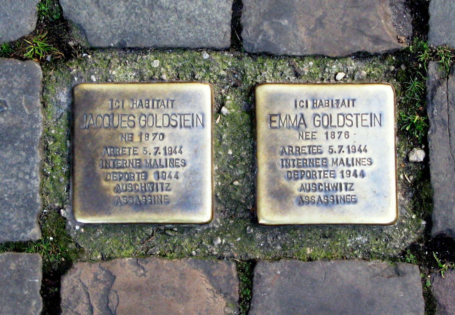 Stolpersteng zu Léck an der Rue Edouard Remouchamps